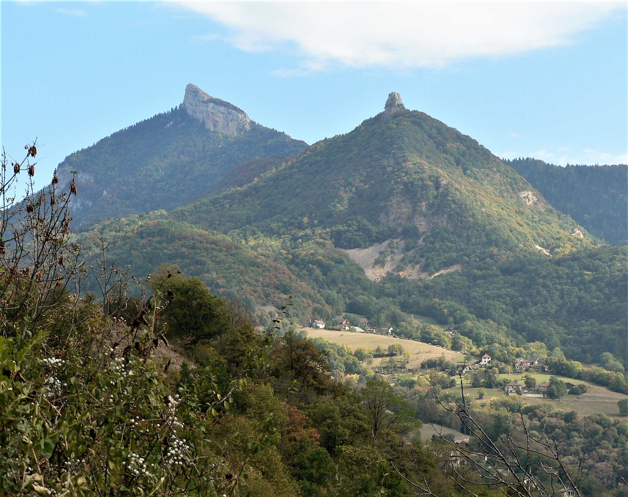 L'Aiguille de Quaix et les hameaux de Quaix-en-Chartreuse. Photo prise sur le chemin entre Saint-Égrève et Proveysieux, à l'occasion de la Metrorando 2018.